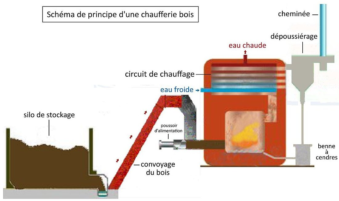 Schéma de principe d'une chaufferie bois